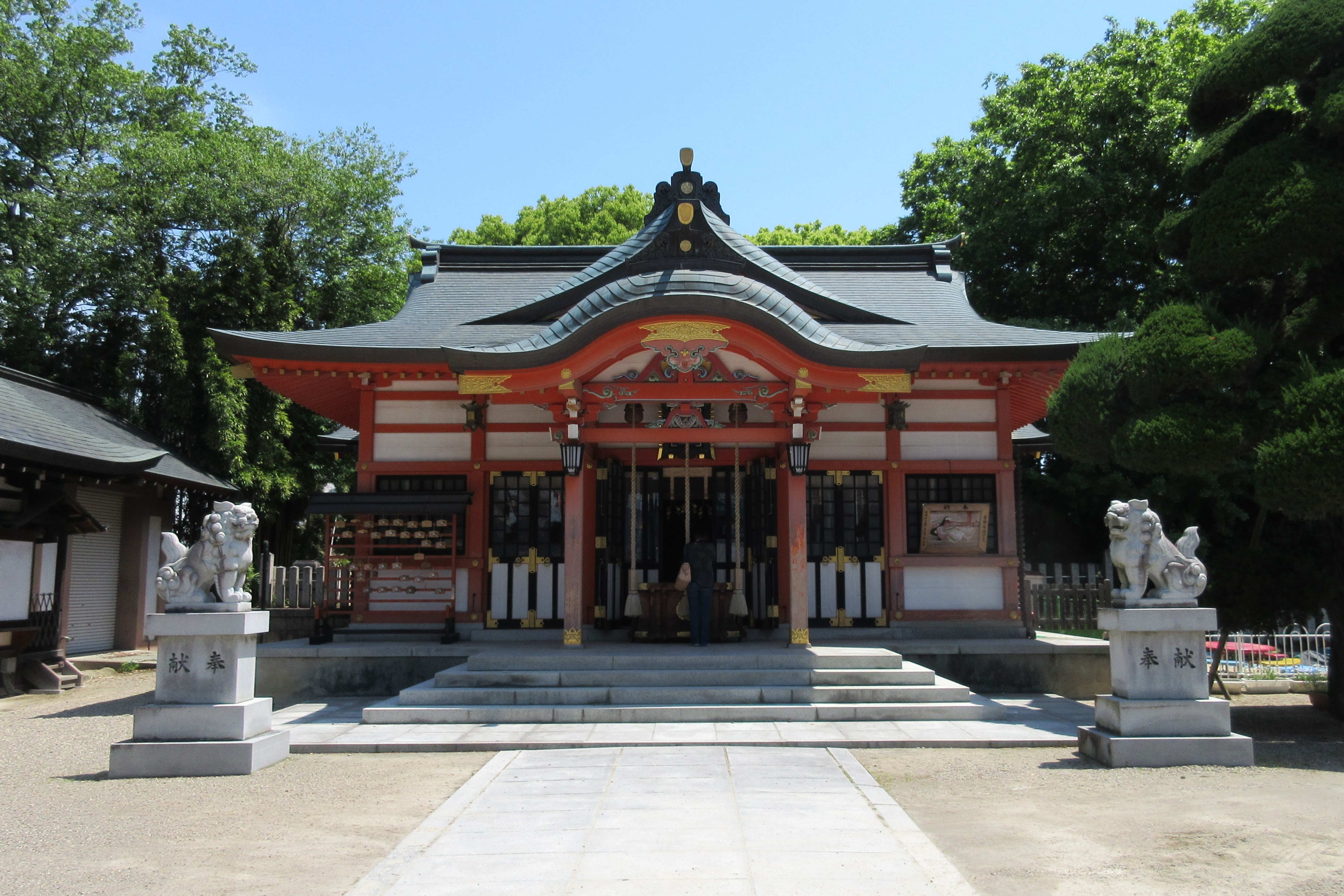 石園座多久虫玉神社